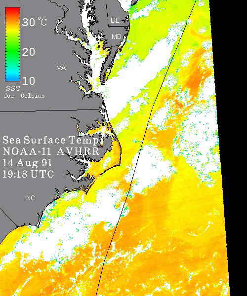 Pre-Hurricane Bob sea surface temperature August 14, 1991.